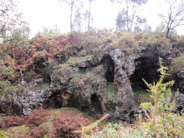 Exploração Romana de Au em Marrancos, Vila Verde